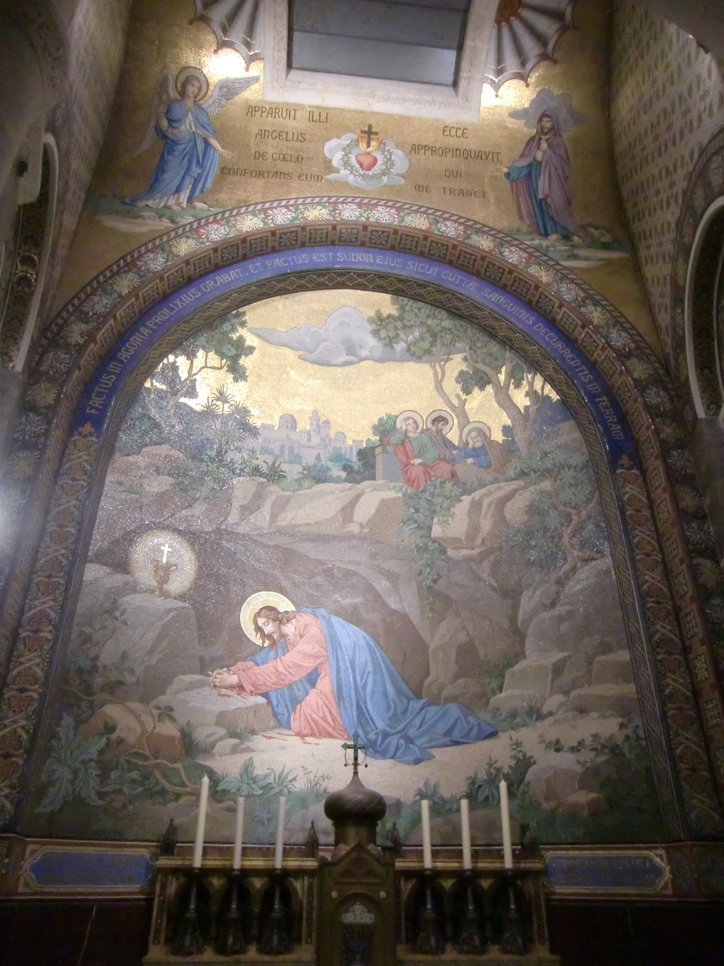 Jésus au Jardin des Oliviers - Mosaîque dans la basilique Notre-Dame du Rosaire à Lourdes